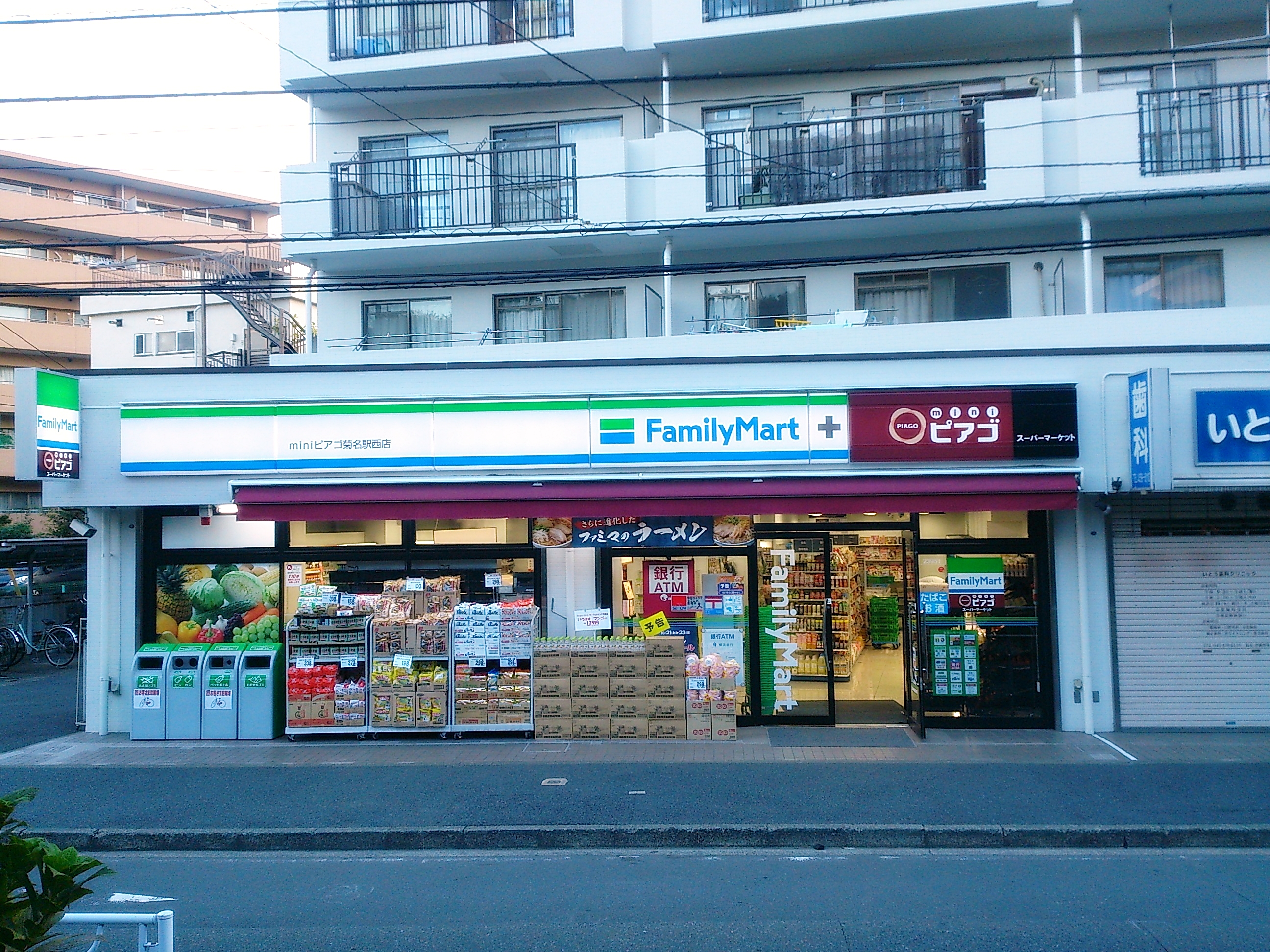 ファミリーマート＋ミニピアゴ菊名駅西店外観